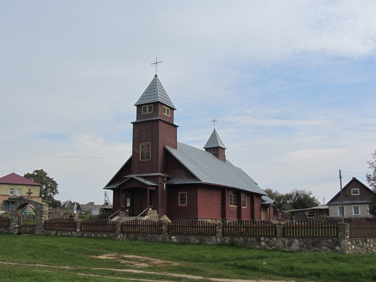 Порплішча. Касцёл